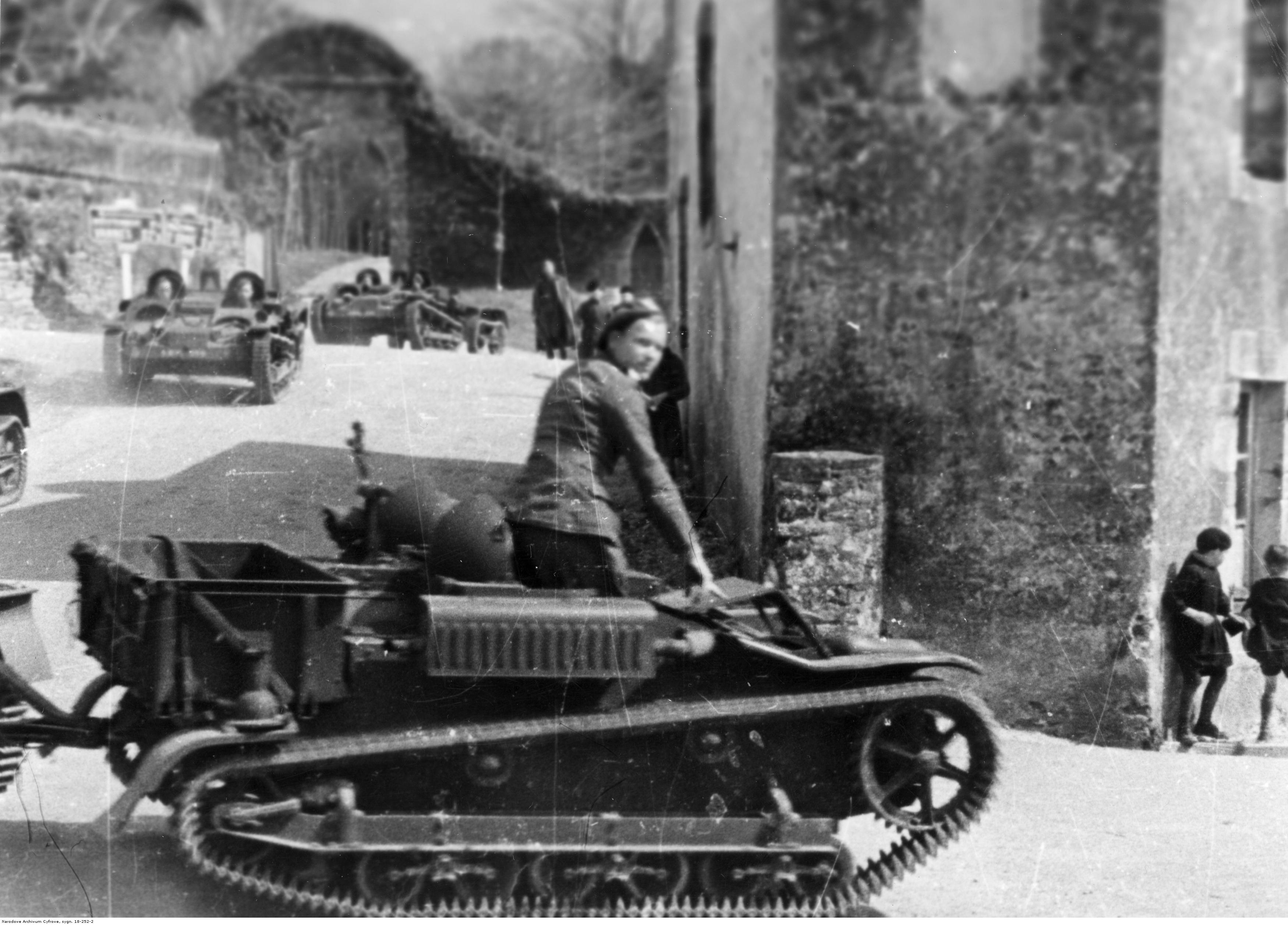 Ciągniki opancerzone Renault UE 1931 Wojska Polskiego we Francji podczas przejazdu przez miasto. Archiwum Fotograficzne Czesława Datki. Sygnatura: 18-252-2